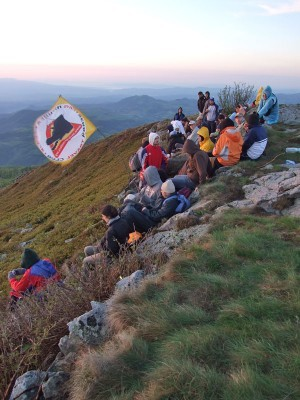 Autor: Klub putnika Srbije Snimljeno na vrhu planine Željin, na godišnjem okupljanju članova, 25. maja 2008. godine.